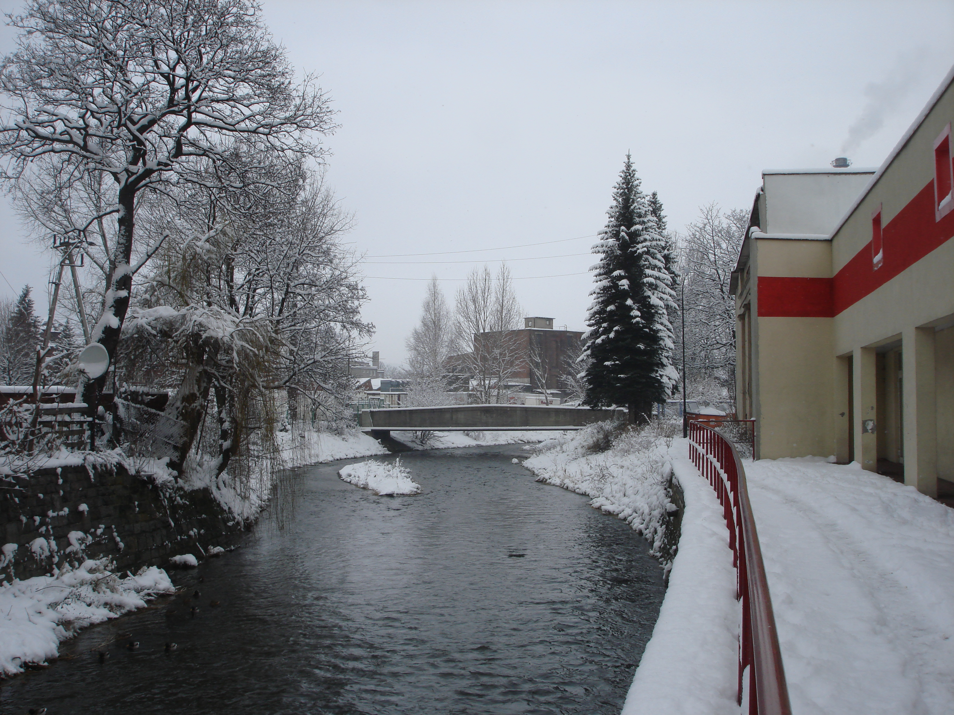 Kamienna Góra, BóbrEsperanto: Kamienna Góra, rivero Bóbr.